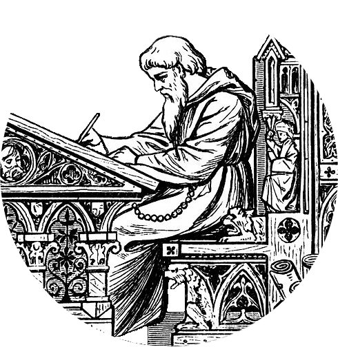 Tondo rappresentante monaco amanuense